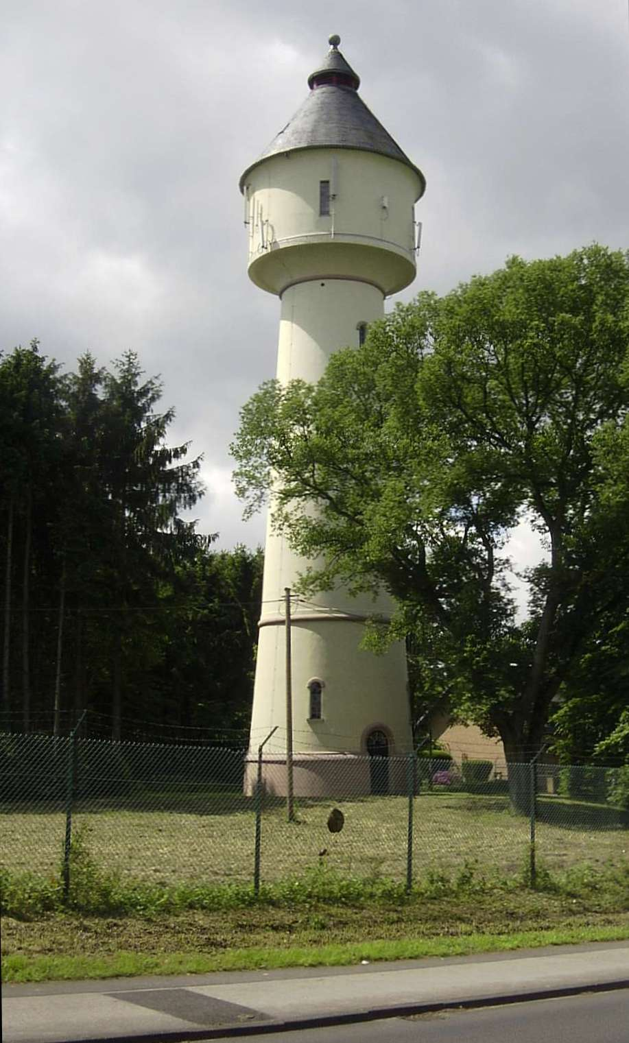 Summary Bildbeschreibung: Arsbecker Wasserturm, erbaut 1913 Quelle: eigenes Foto Fotograf/Zeichner: bodoklecksel 17:07, 4. Jun 2006 (CEST) Datum: Juni 2006 Sonstiges: ...